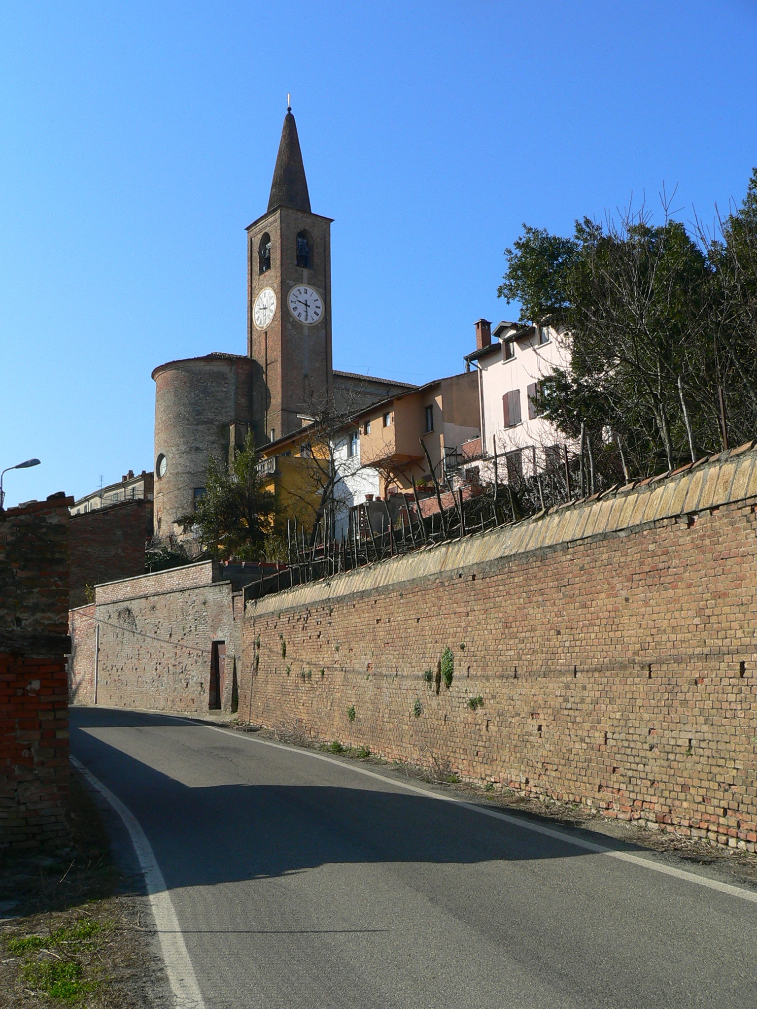 La Chiesa parrocchiale di Casteggio; sorge sull'omonima piazzetta del Pistornile; ricostruita ai primi dell'800 sulle strutture della vecchia collegiata cinquecentesca, è opera dell'architetto Marchesi di Pavia.